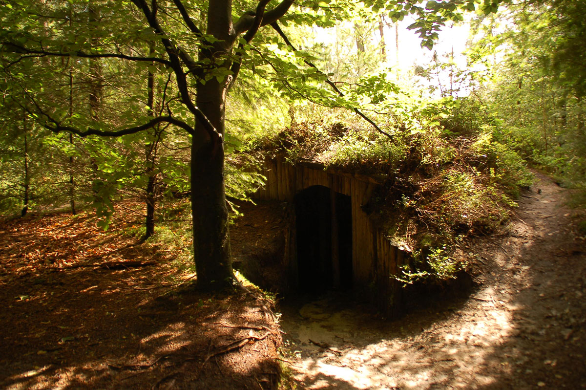 Nagebouwd hutje in 'Verscholen Dorp'. Reconstruction Dugout shelter in Vierhouten, the Netherlands